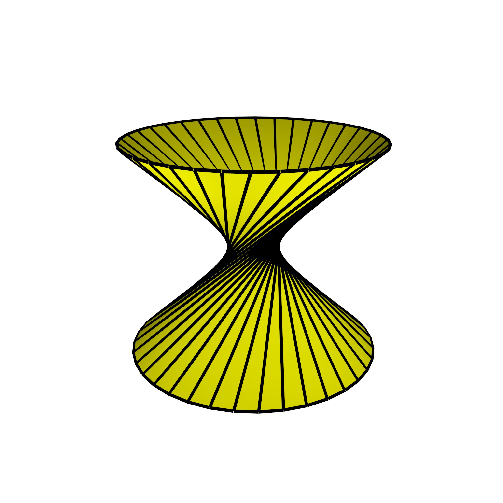 Српски (ћирилица): Хиперболоид ротацијом дужи